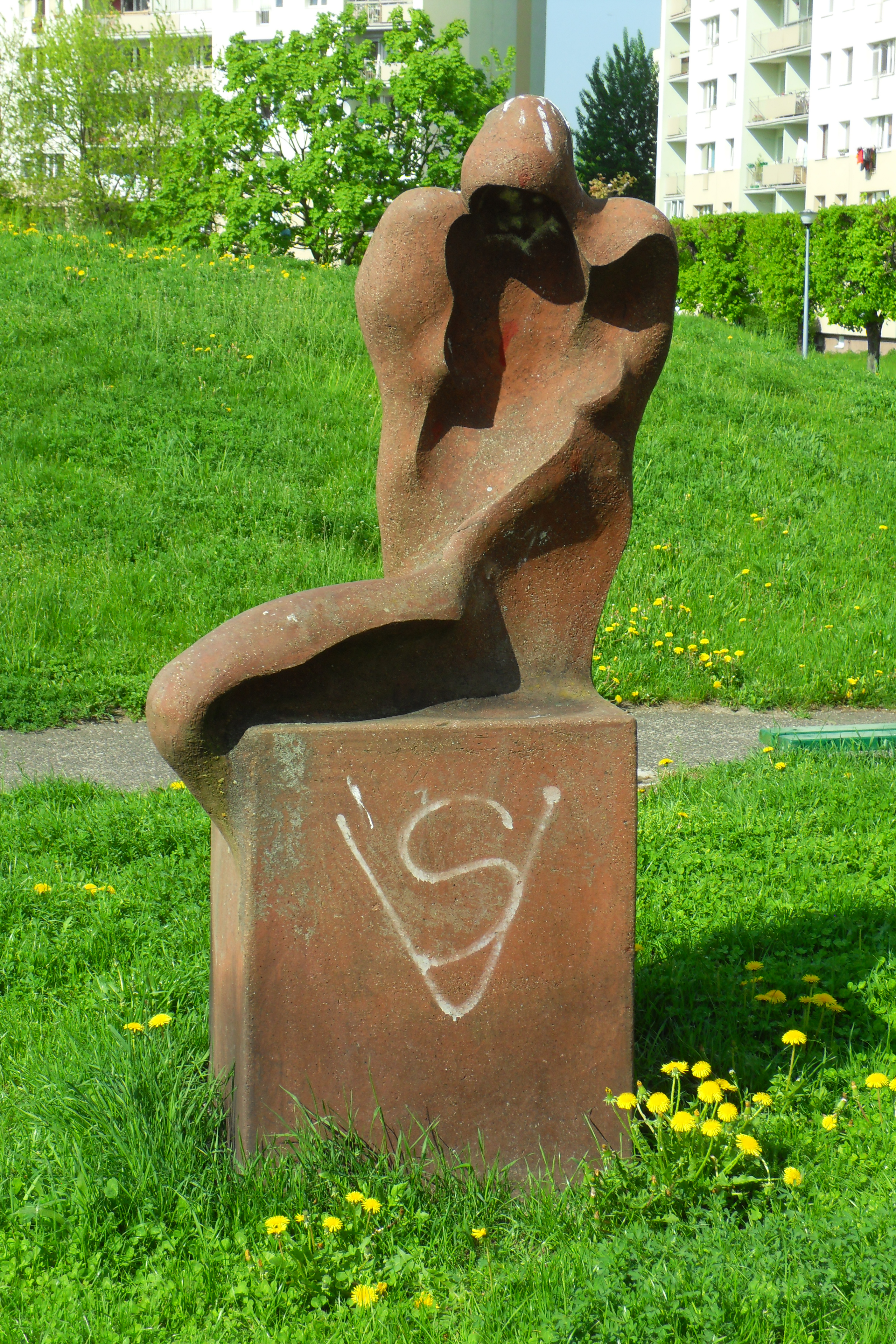 Gdańsk Żabianka, ceramiczna rzeźba z cyklu "Futerały", autorka: Swietlana Zerling.